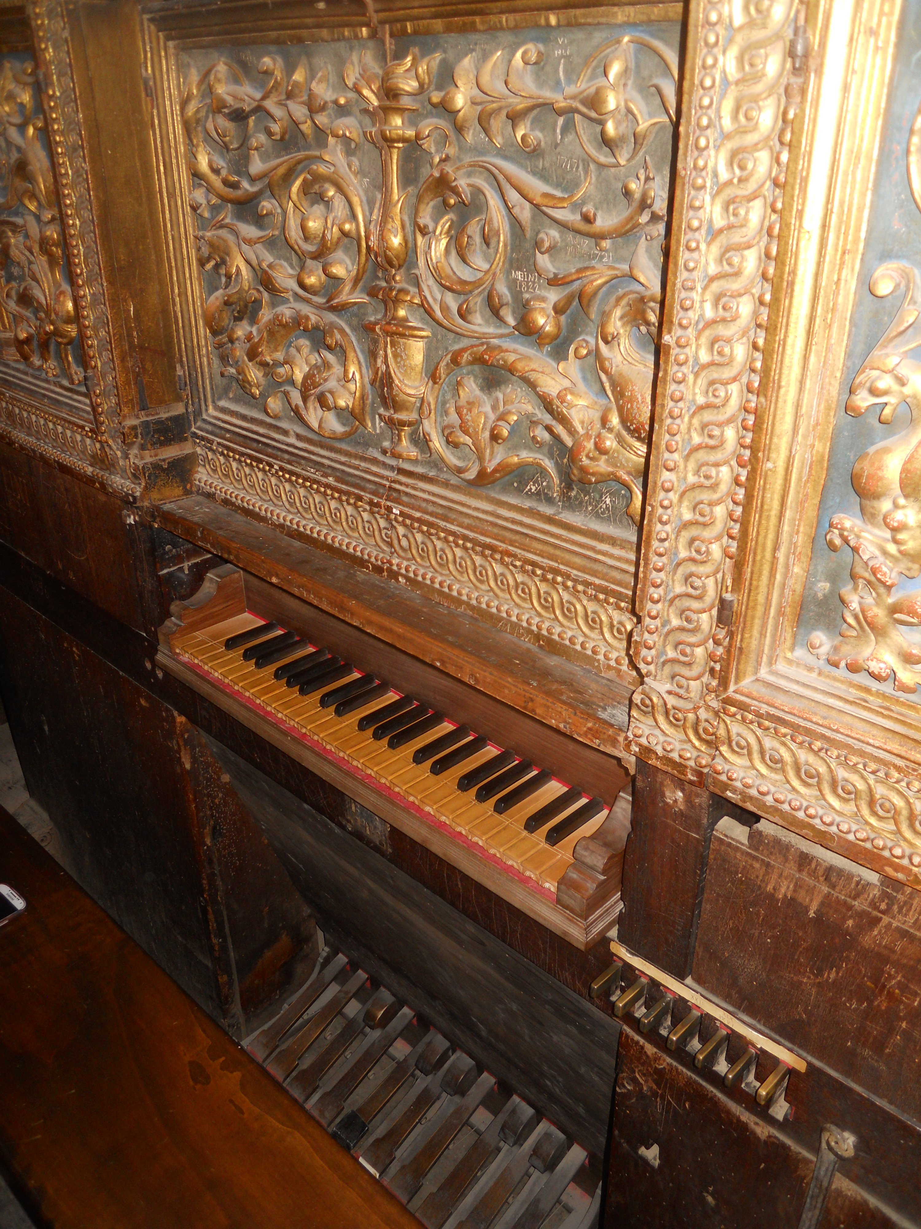 Consolle dell'organo a canne della chiesa della Santissima Annunziata in Siena, costruito da Giovanni Piffero nel 1514-1518